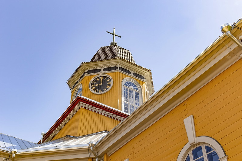 Korpilahden kirkko on valmistunut vuonna 1827.